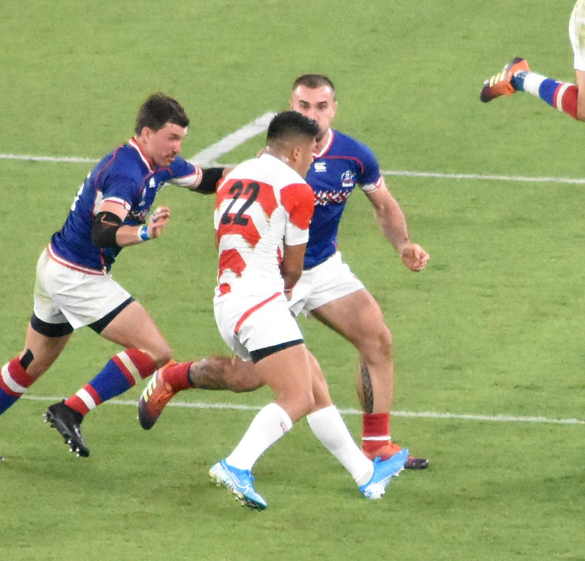 松田 力也